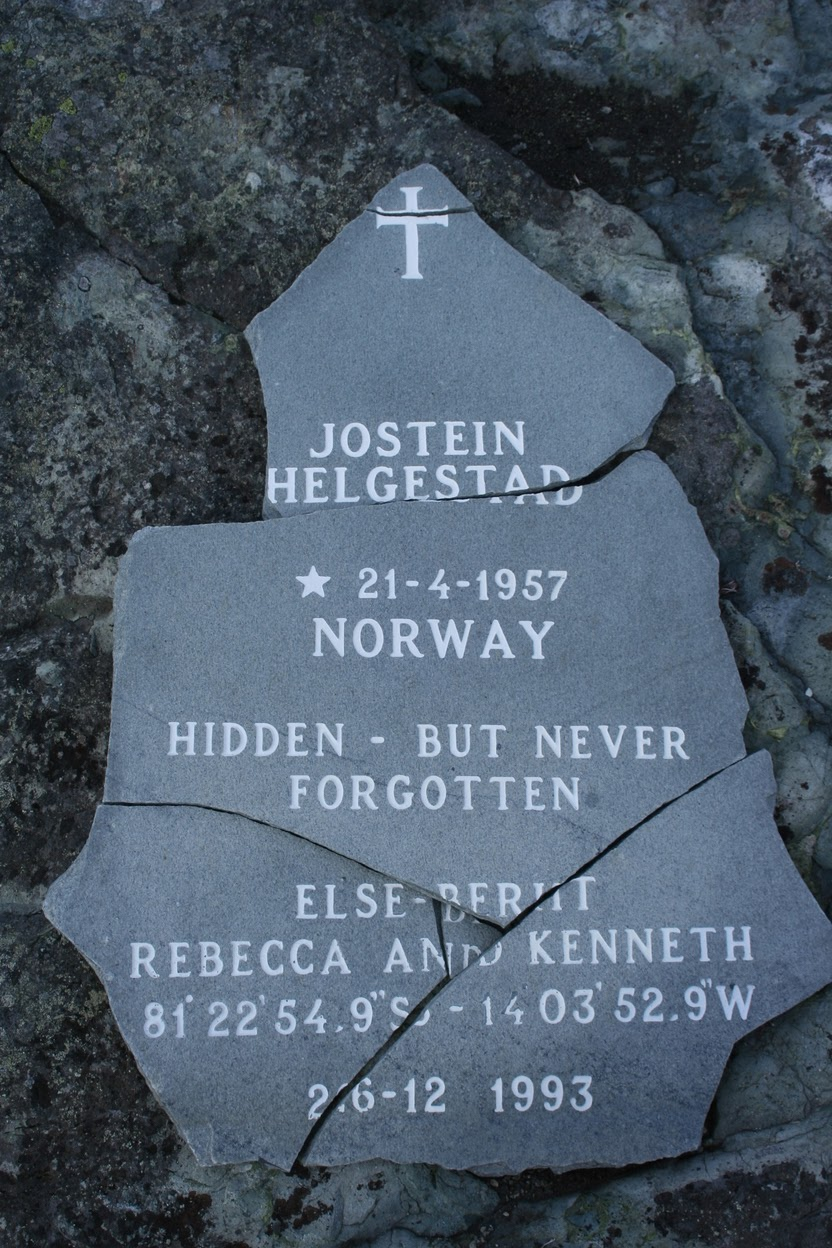 Jostein Helgestad (født 21. april 1957, død 26. desember 1993) var en norsk militær og medarbeider til Monica Kristensen Solås under hennes tredje sydpolsekspedisjon. Han døde romjula 1993 da snøscooteren han kjørte falt ned i en bresprekk. En minnestein etter ham er reist i Paradise Bay på Antarktishalvøya.